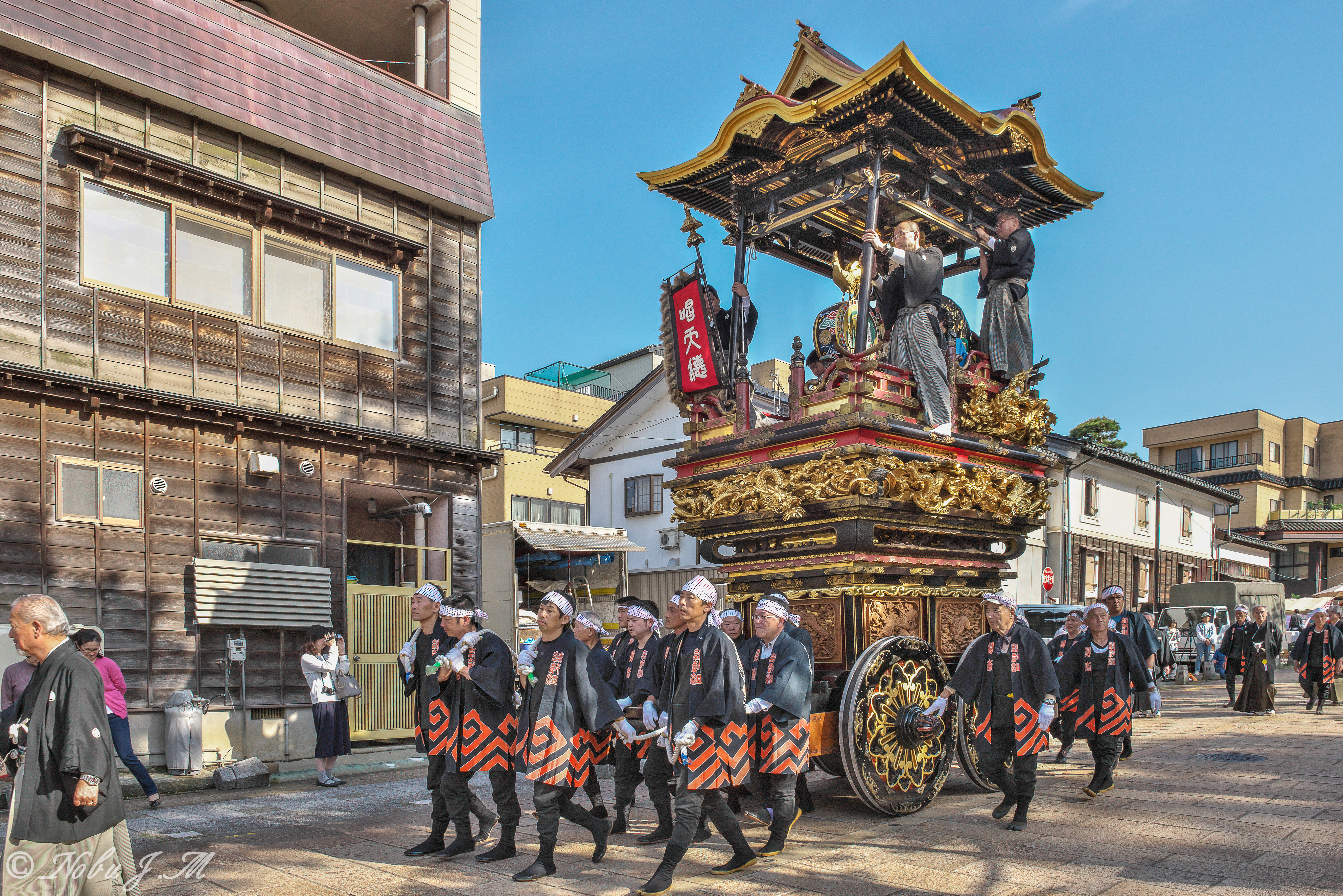 富山県南砺市城端町で毎年5月5日に行われている曳山祭り。ユネスコ無形文化遺産でもある。